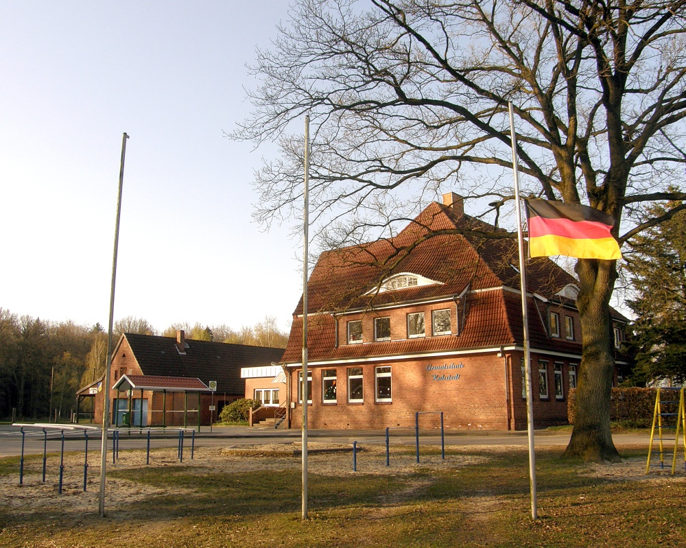 Bilder aus Kuhstedt